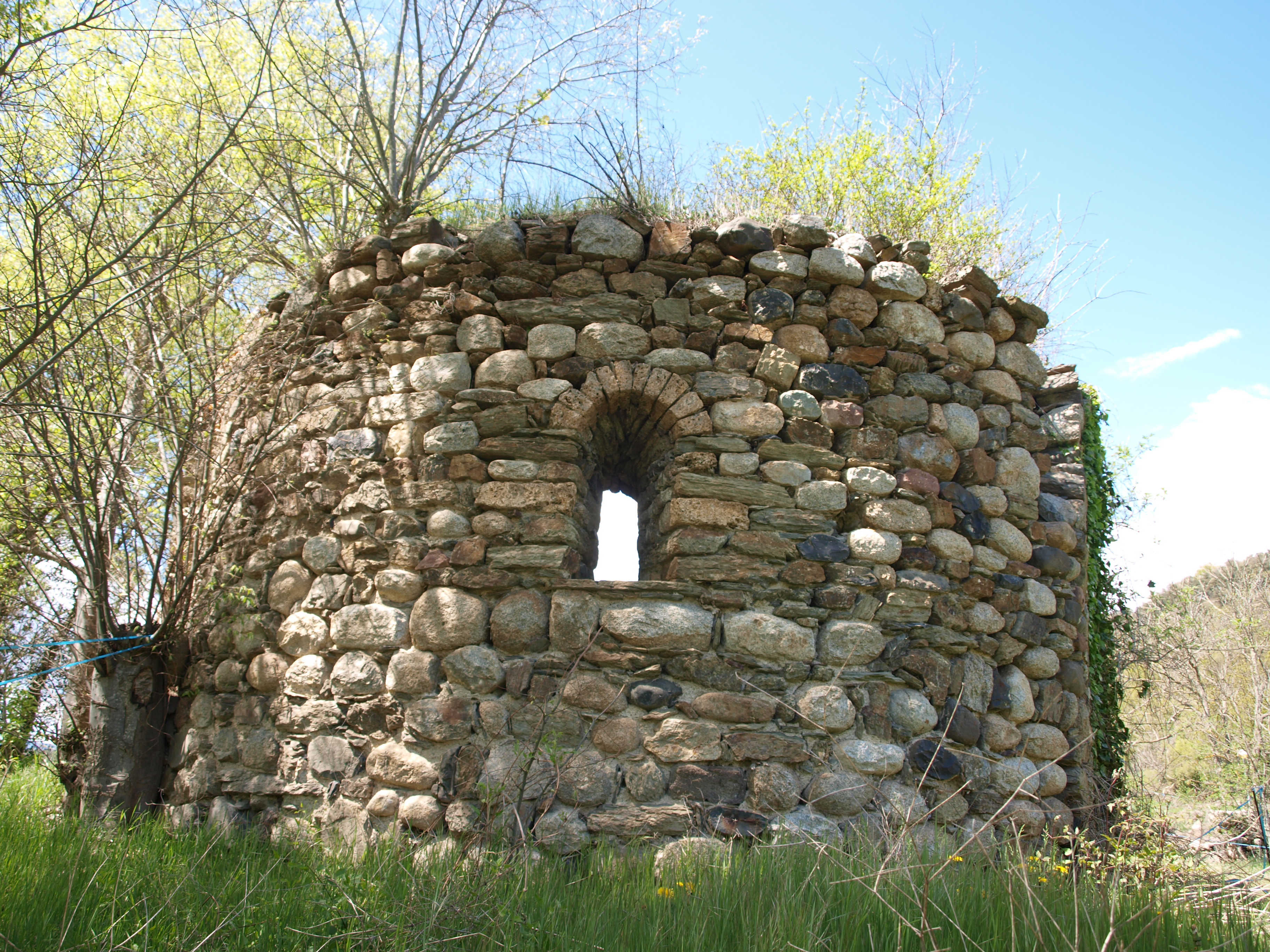 Església de Sant Esteve del Pont (la Seu d'Urgell)